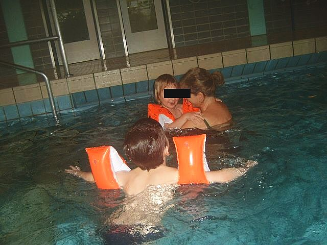 Kindergartenkinder mit Schwimmflügeln